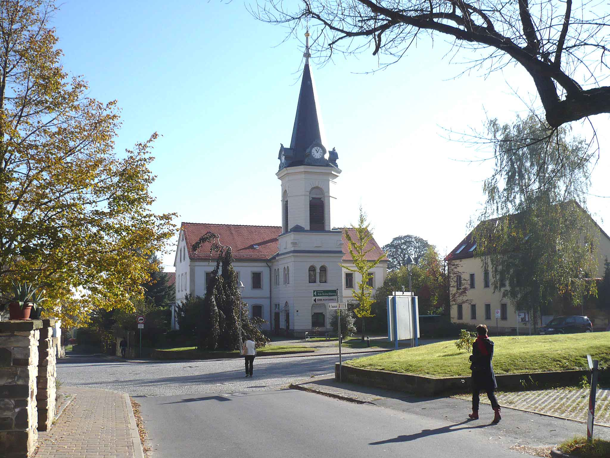 Evangelische Kirche in Bannewitz bei Dresden